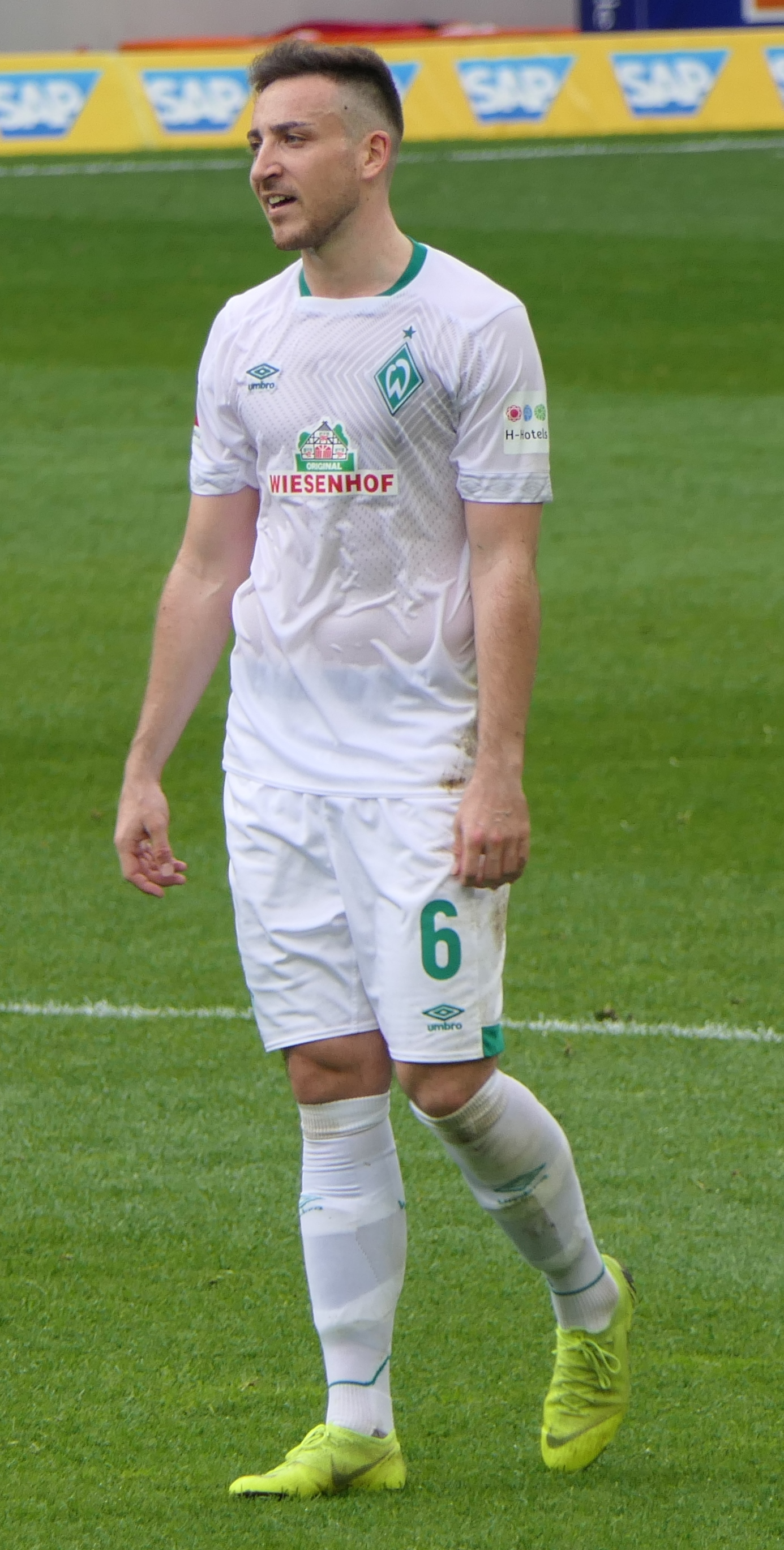 Der Fussballprofi Kevin Möhwald im Trikot vom SV Werder Bremen beim Auswärtsspiel gegen die TSG 1899 Hoffenheim am 11.05.2019.